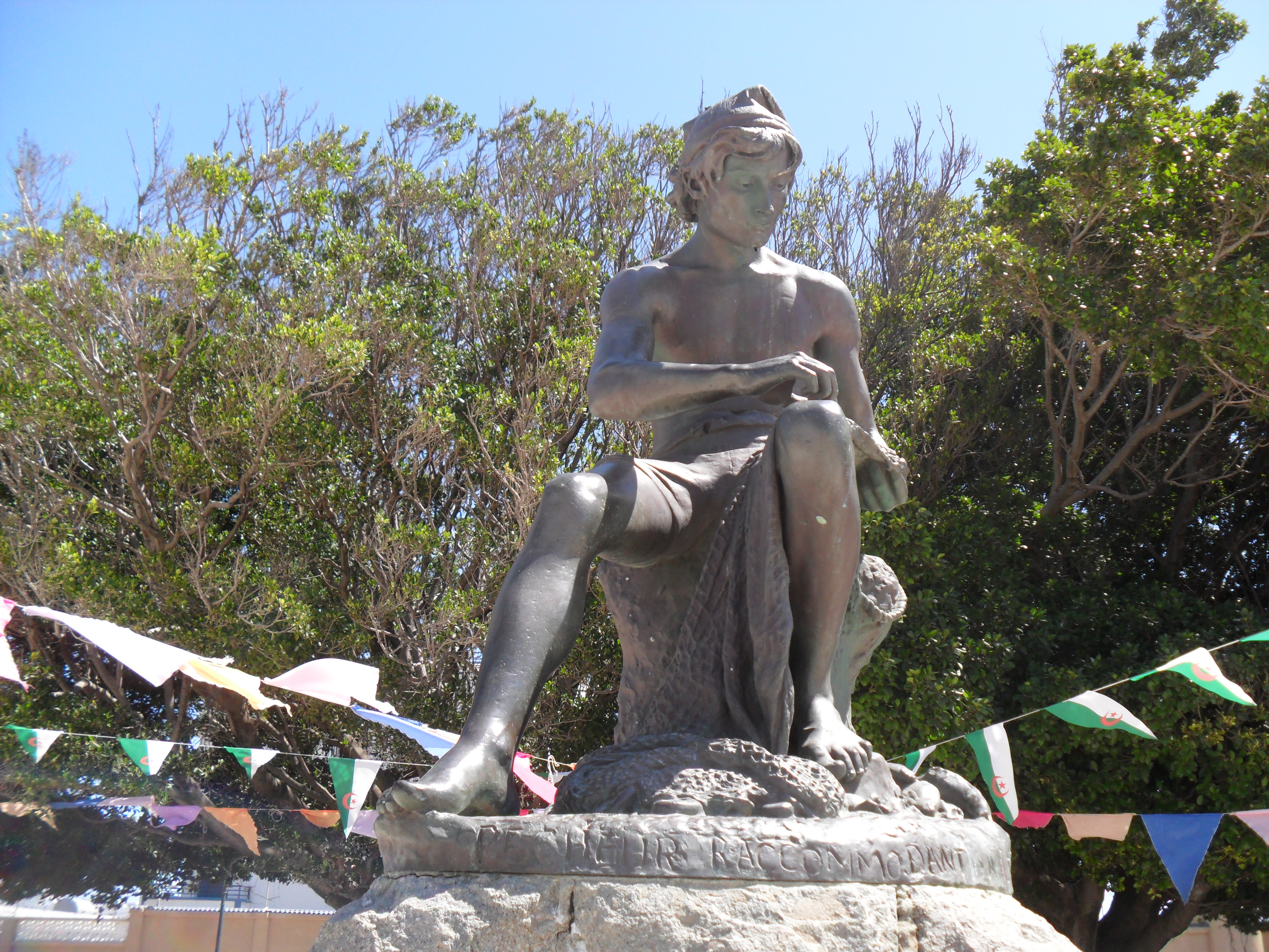 Statue du Pêcheur à Jijel, Wilaya de Jijel (Algérie). Sculpture de Lange Guglielmo.